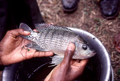 male Oreochromis niloticus